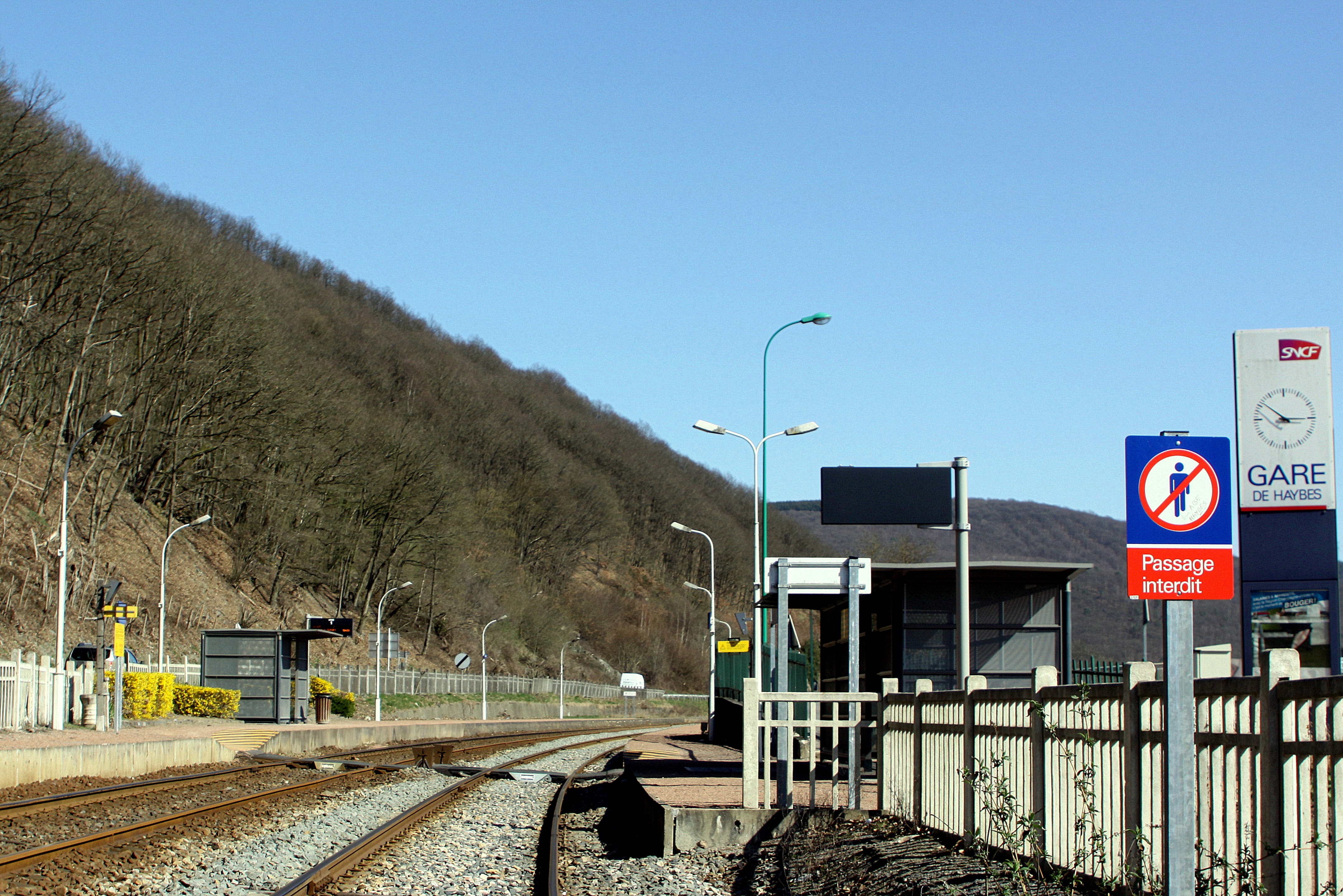 Vue an d'Gare vun Haybes an Direktioun Givet